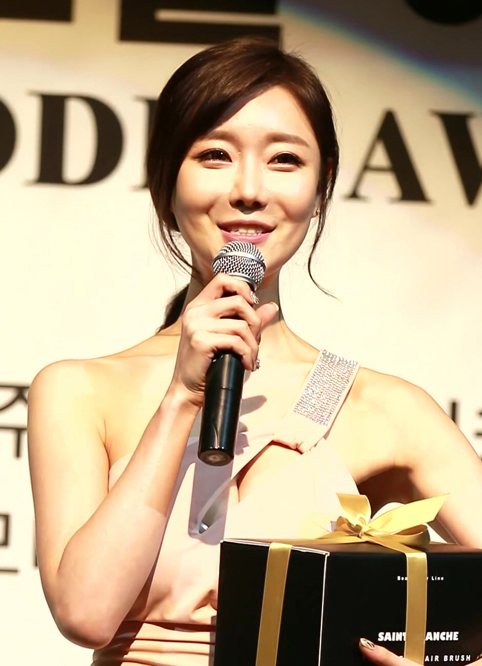 151216 2015 한국레이싱모델어워즈 에스디네트웍스 생블라쉬 특별상 최슬기 직캠 (1:27)